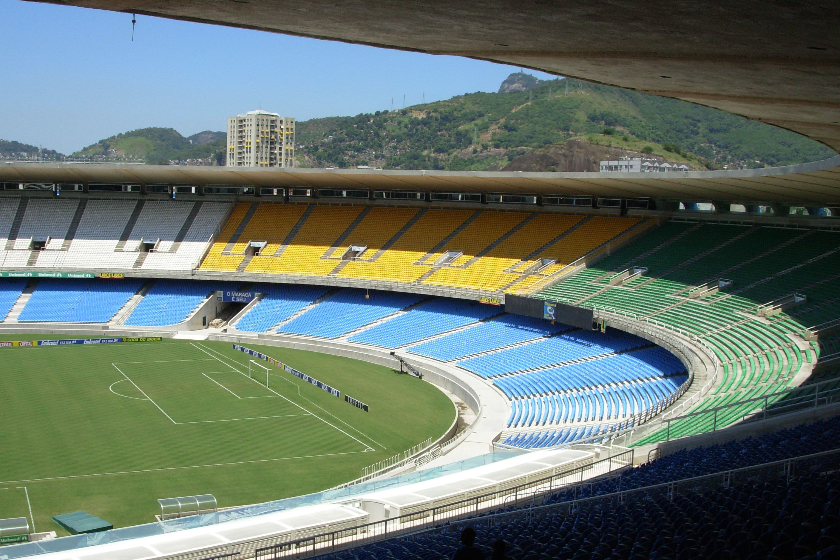 Stadion Maracanã w Rio de Janeiro (strona prawa)